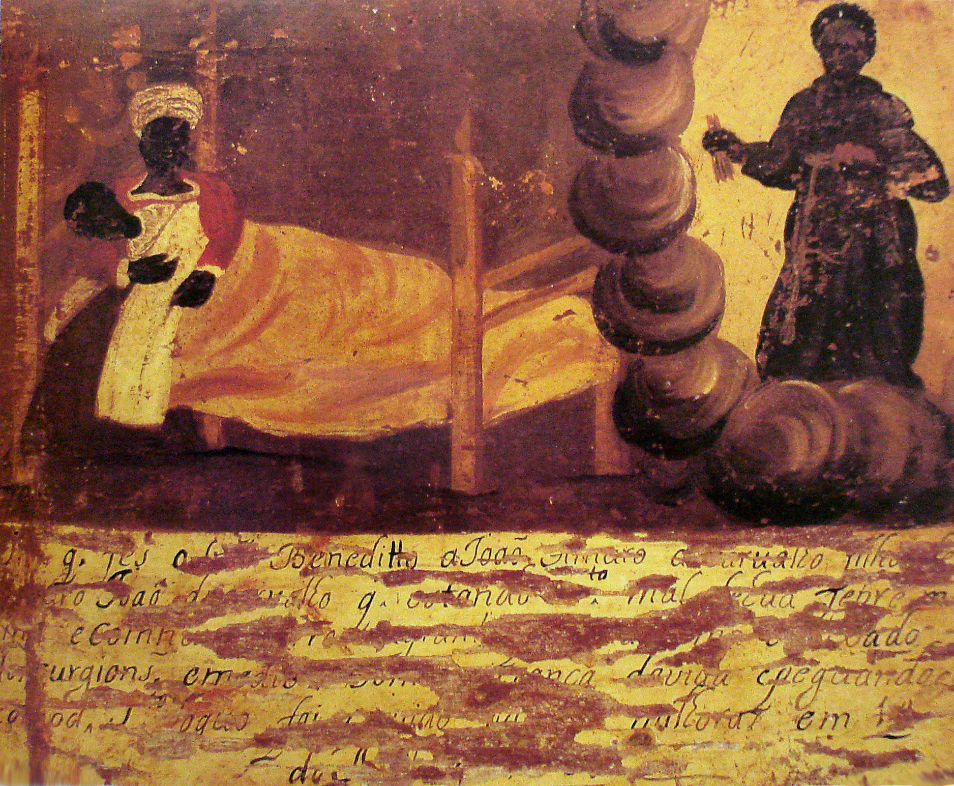 Ex voto, invocação a São Benedito, têmpera sobre madeira